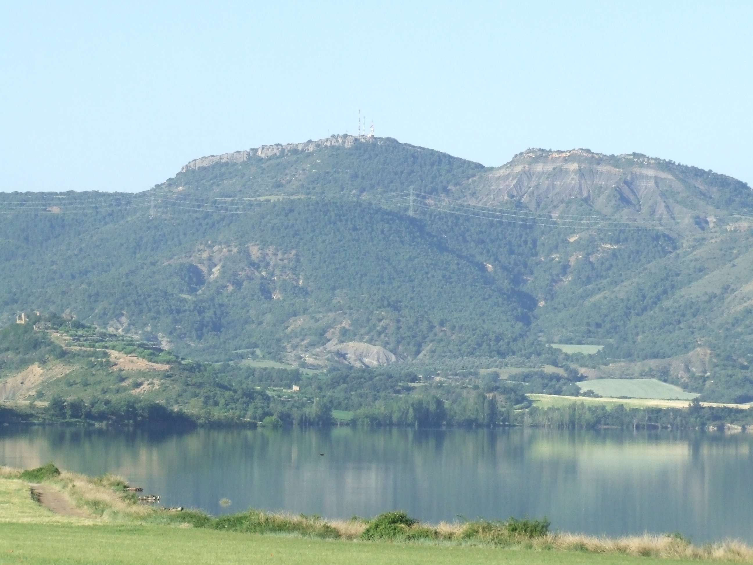 El Roc de Neret (Orcau, Isona i Conca Dellà, Pallars Jussà)